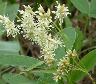 Blütenansicht von Luzula nivea